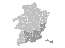 Gemeentekaart Herstappe, eigen werk